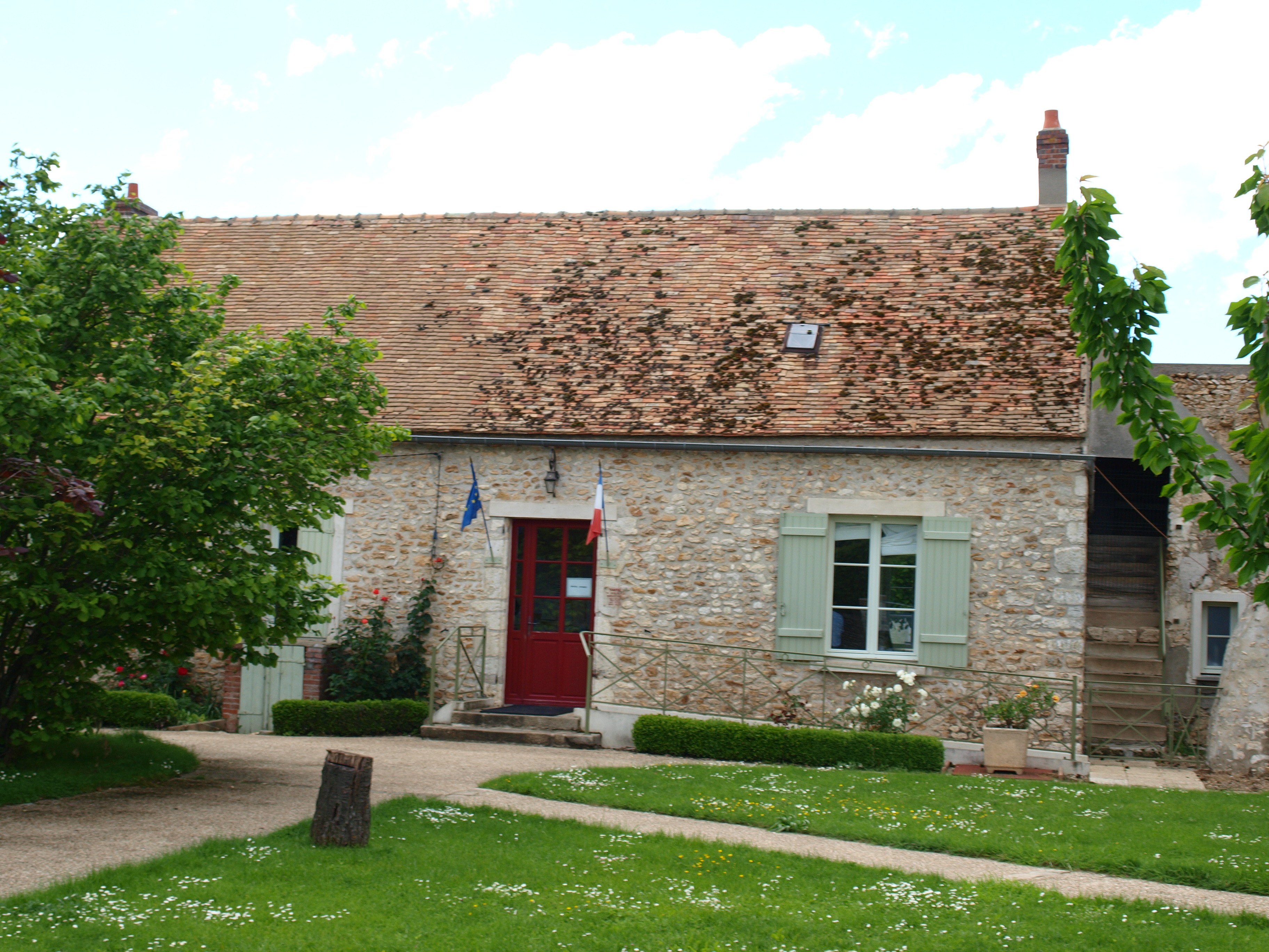 Mérobert